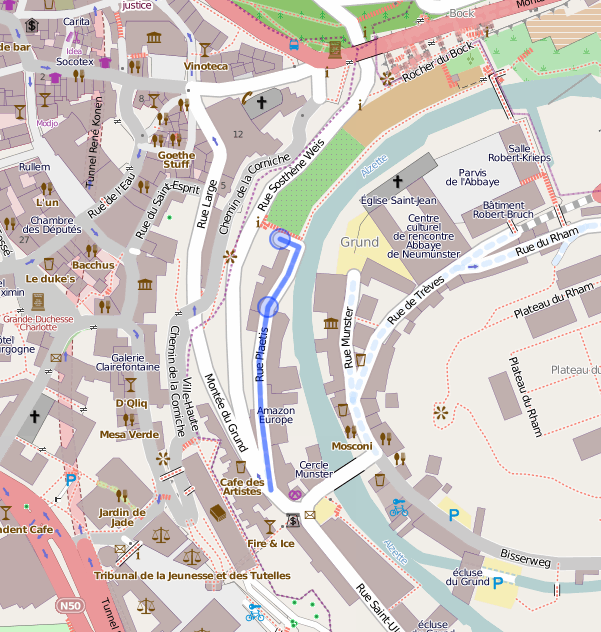 D'Plaetisgaass am Stadgronn an der Stad Lëtzebuerg.